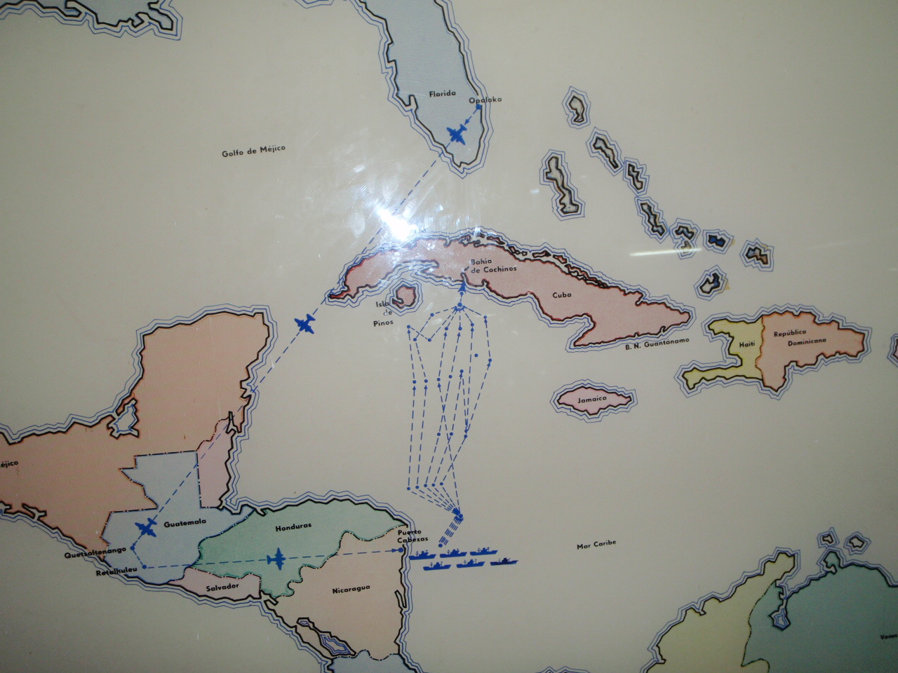 Invasion in der Schweinebucht, Bild aus Ausstellung, Giron, Cuba